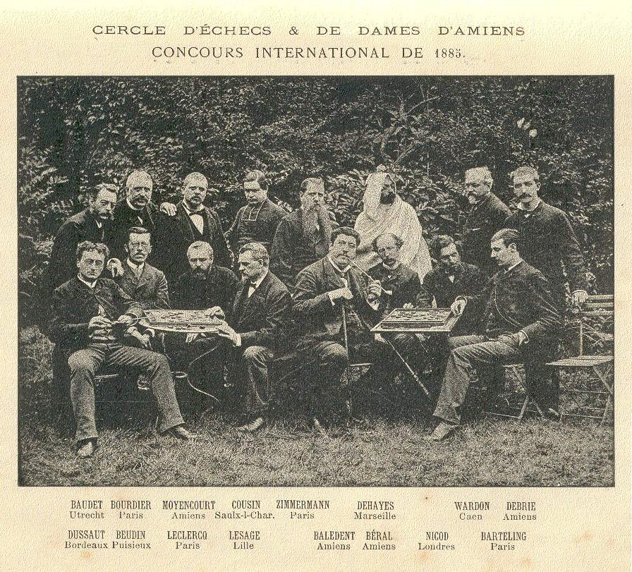 Коллективная фотография участников Первого международного шашечного турнира в Амьене 1885 года